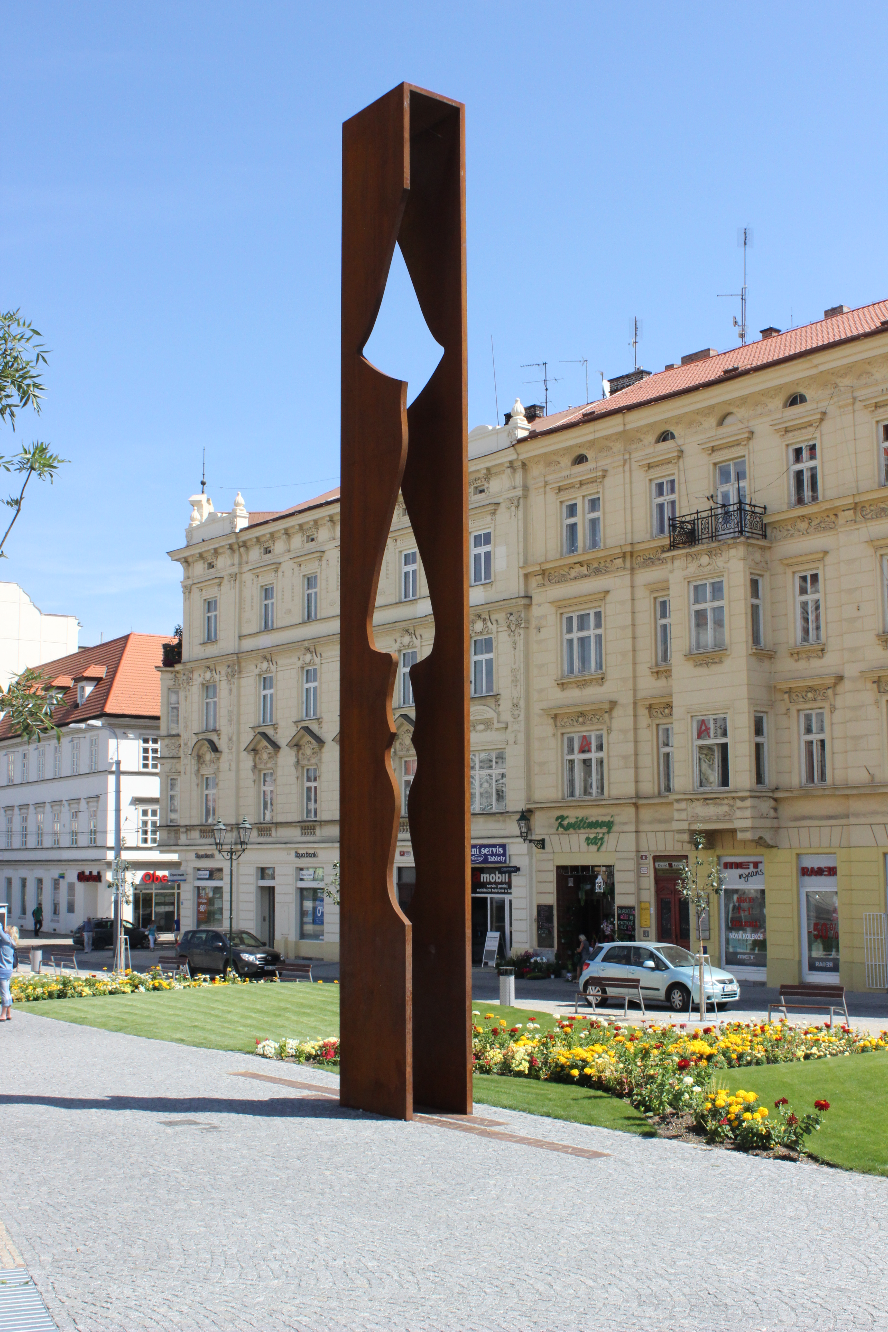 Pomník generála Pattona v Plzni.